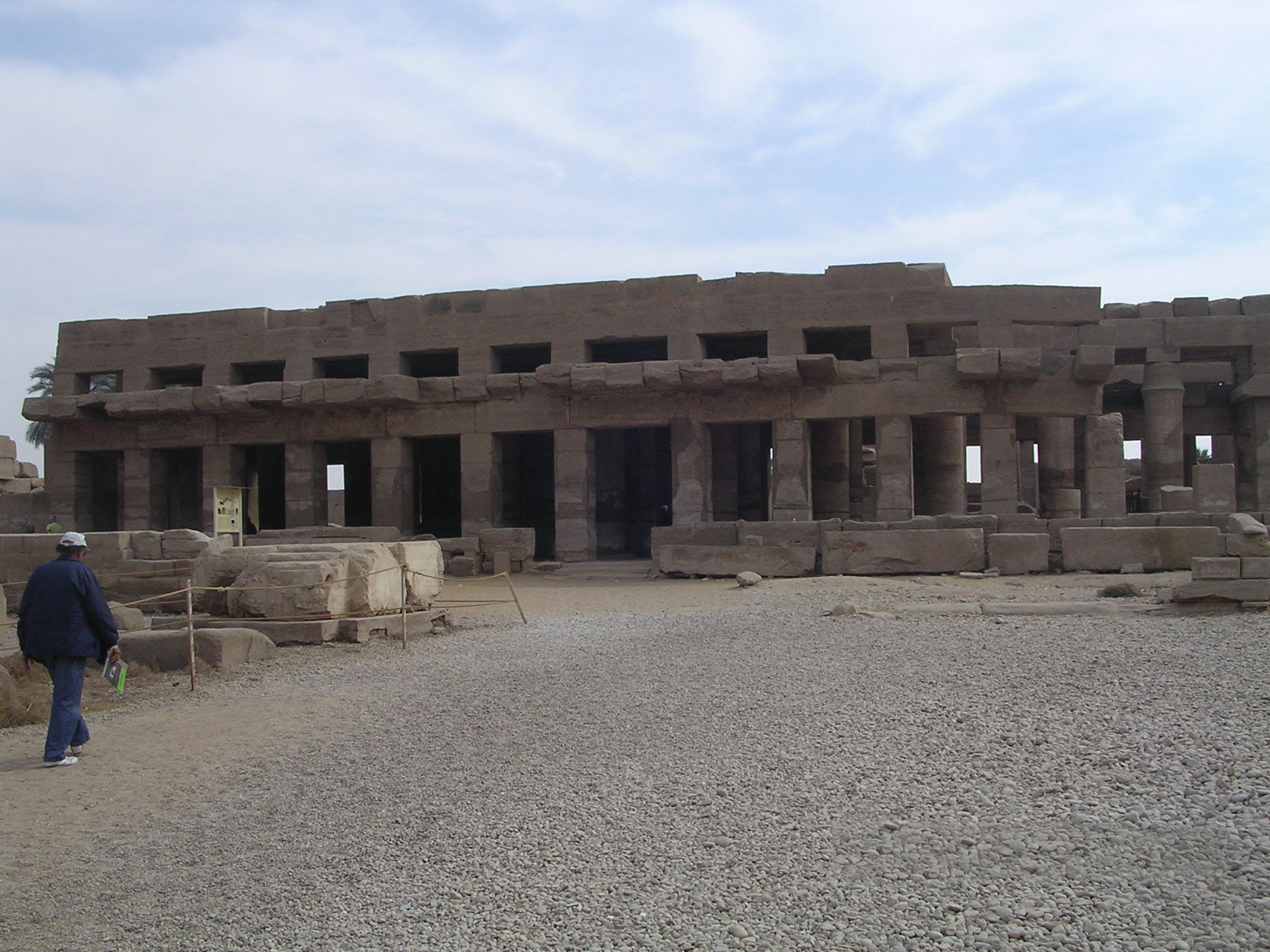 Descrizione: Akh-Menu Tempio Giubilare di Thutmosi III - Karnak, autore:Amaunet, fonte:lavoro proprio, licenza GFDL, sono l'autore